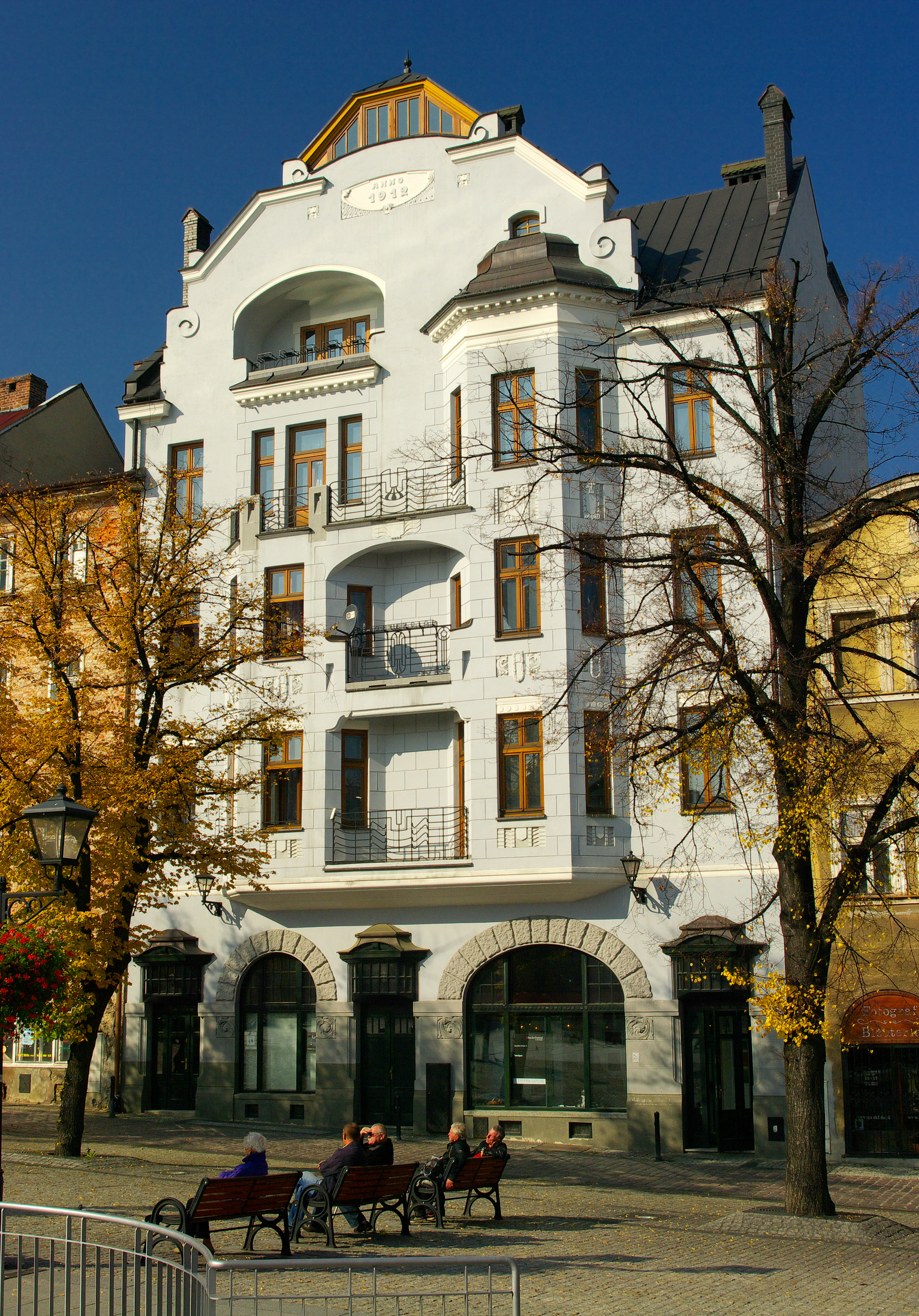 Bielsko-Biała Rynek - Kamienica przy pierzei północnej